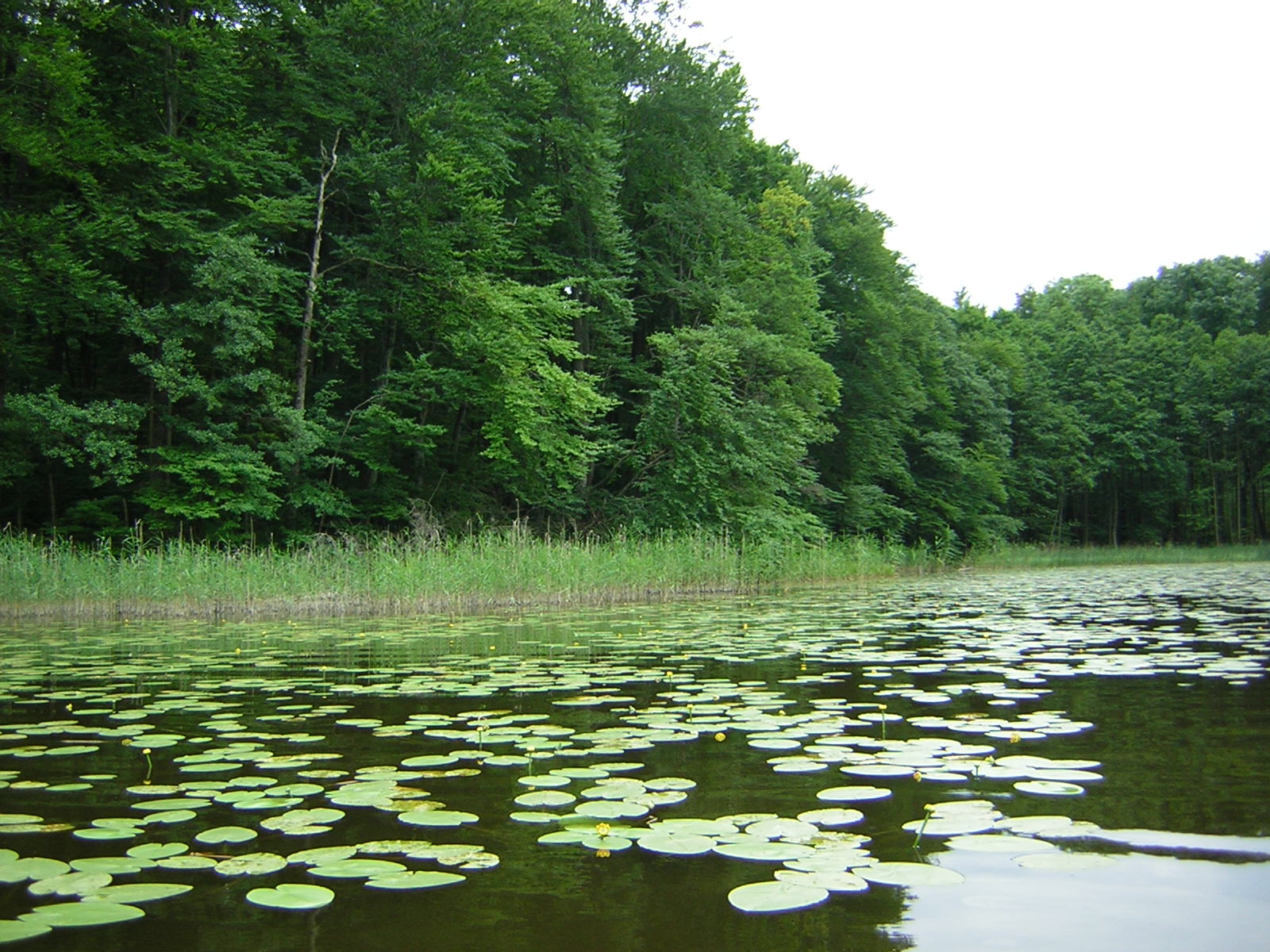 Jezioro Jeziorak (okolice Jażdżówek)